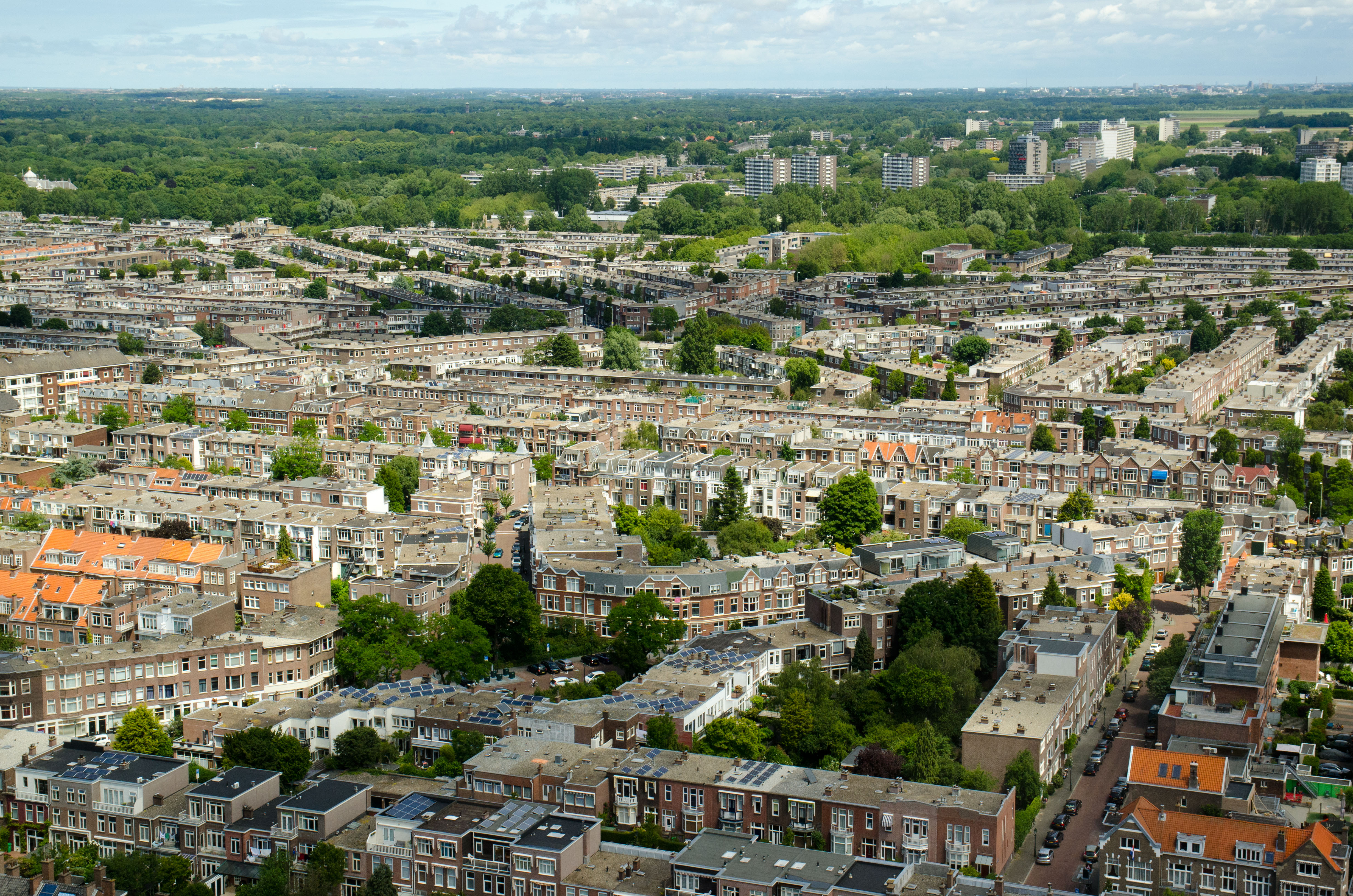 Uitzicht over de Haagse wijk Bezuidenhout vanaf de 25e verdieping van het WTC The Hague. De diagonale straten die kenmerkend zijn voor Bezuidenhout zijn duidelijk herkenbaar. Links is nog net paleis Huis ten Bosch te zien. Op de achtergrond zijn de flats van Mariahoeve zichtbaar, in de verte is Leiden zichtbaar.